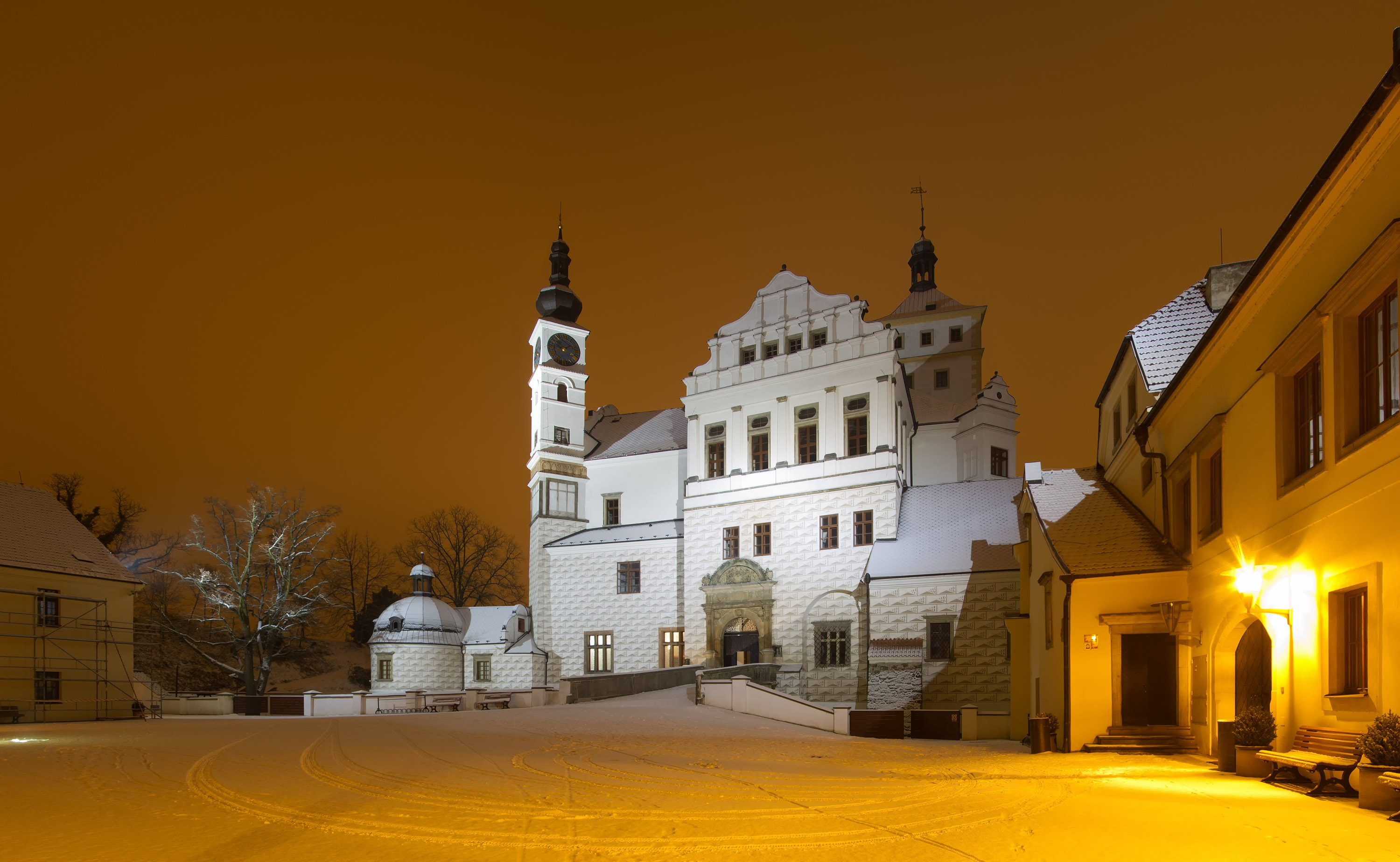 Pardubický zámek, Pardubice 1